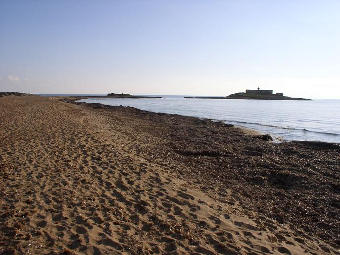 Isola delle Correnti. Sicily, (by G. Melfi, dec. 2006)